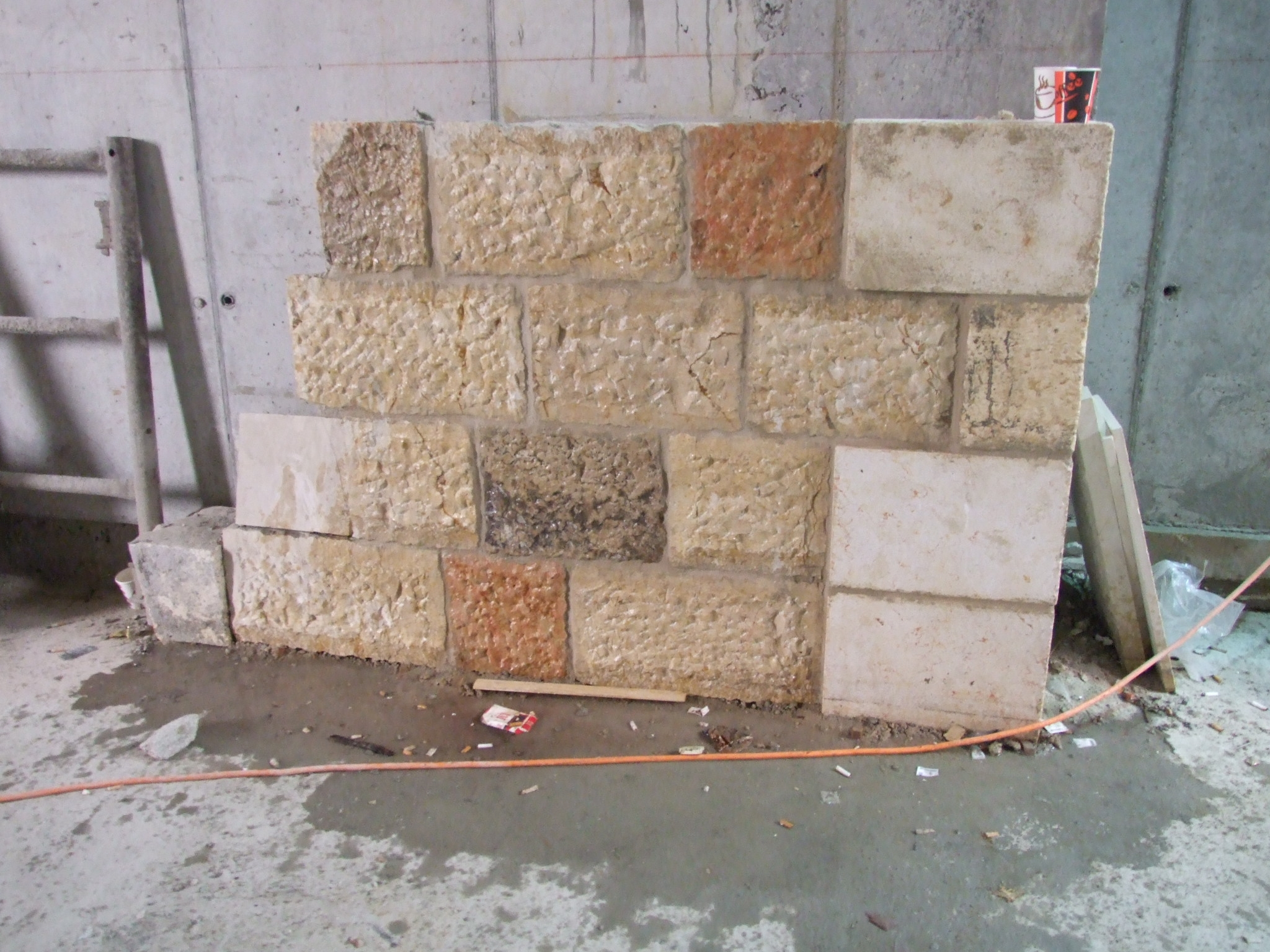 אבן סלייב (דמוי) בממילא ירושלים